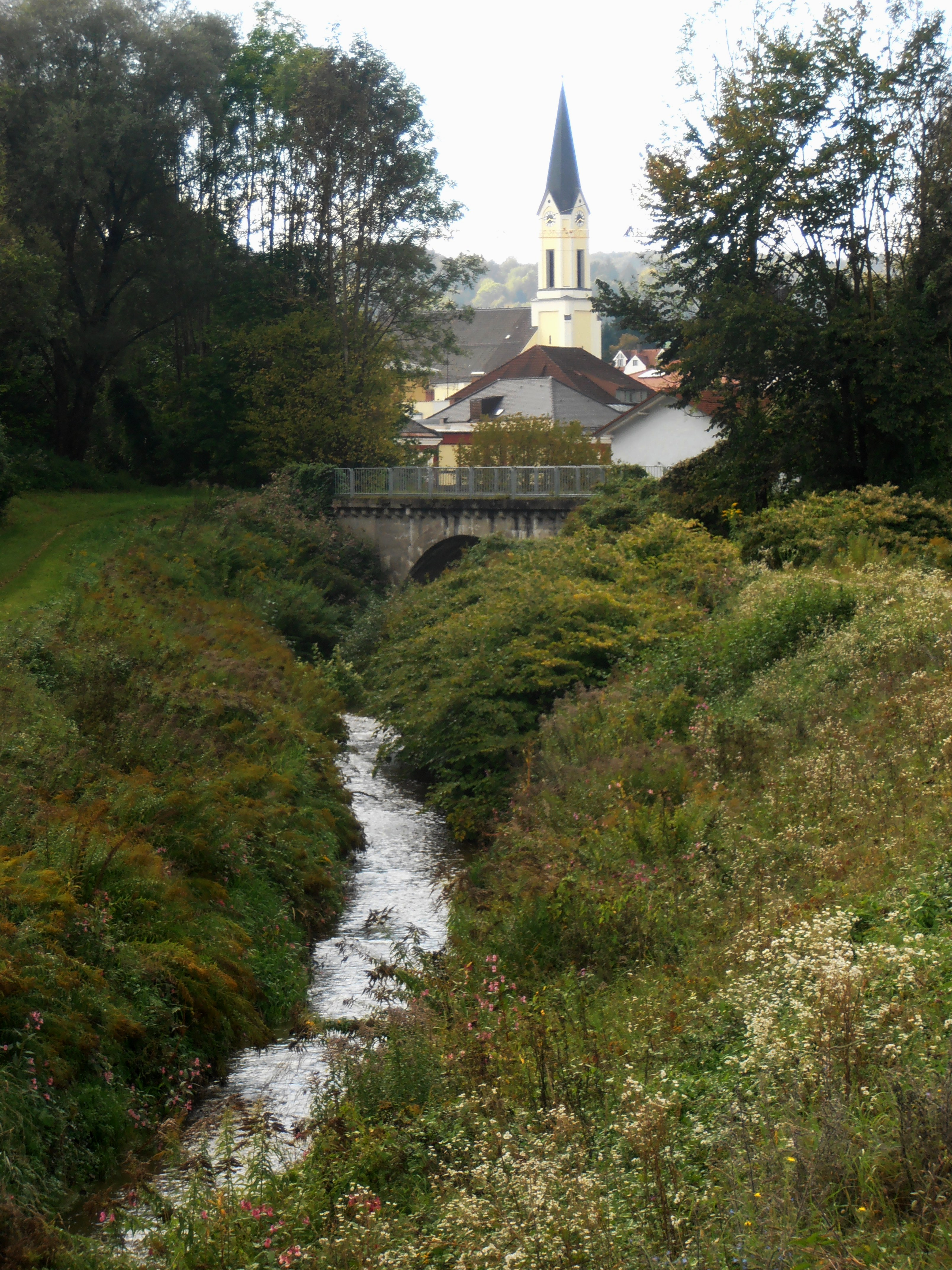 OLYMPUS DIGITAL CAMERA; Der Simbach in Simbach am Inn